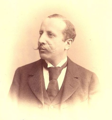 Oskar Israel